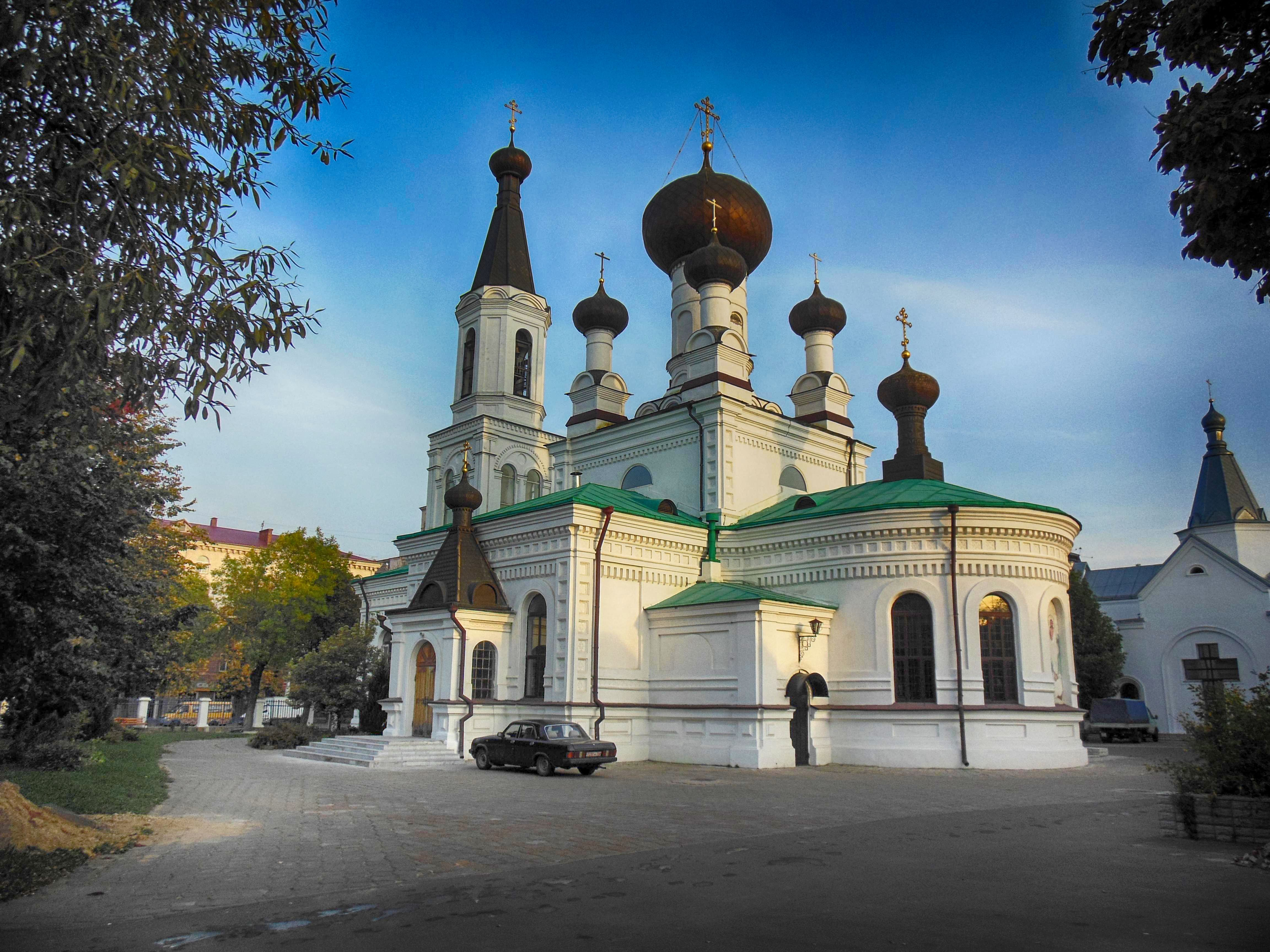 Царква Трох Свяціцеляў. г. Магілёў Беларуская (тарашкевіца): Царква Трох Сьвяціцеляў. г. Магілёў This is a photo of Belarusian heritage monument. Reference number: 513Г000041 ( WLM)